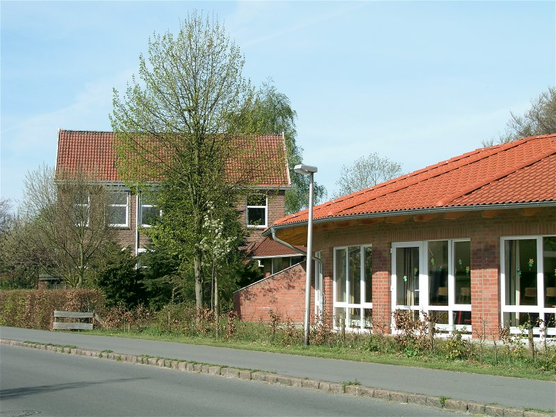 Grundschule Heidgraben im Frühjahr 2007